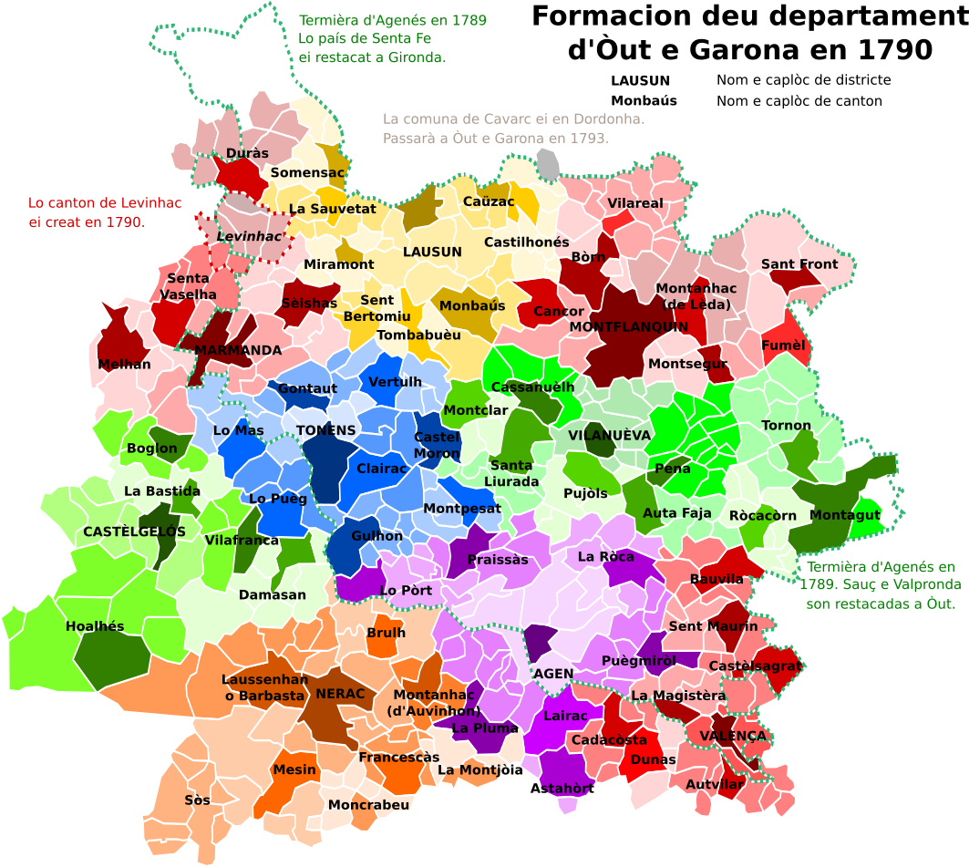 Mapa de las divisions administrativas d'Òut e Garona en 1790